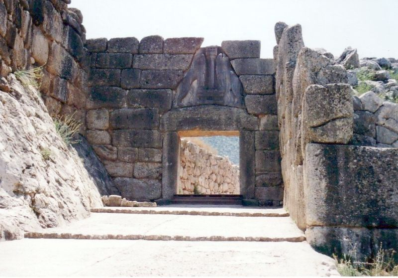 Das "Löwentor" von Mykene, in vorklassischer Zeit eine der bedeutendsten Städte Griechenlands.